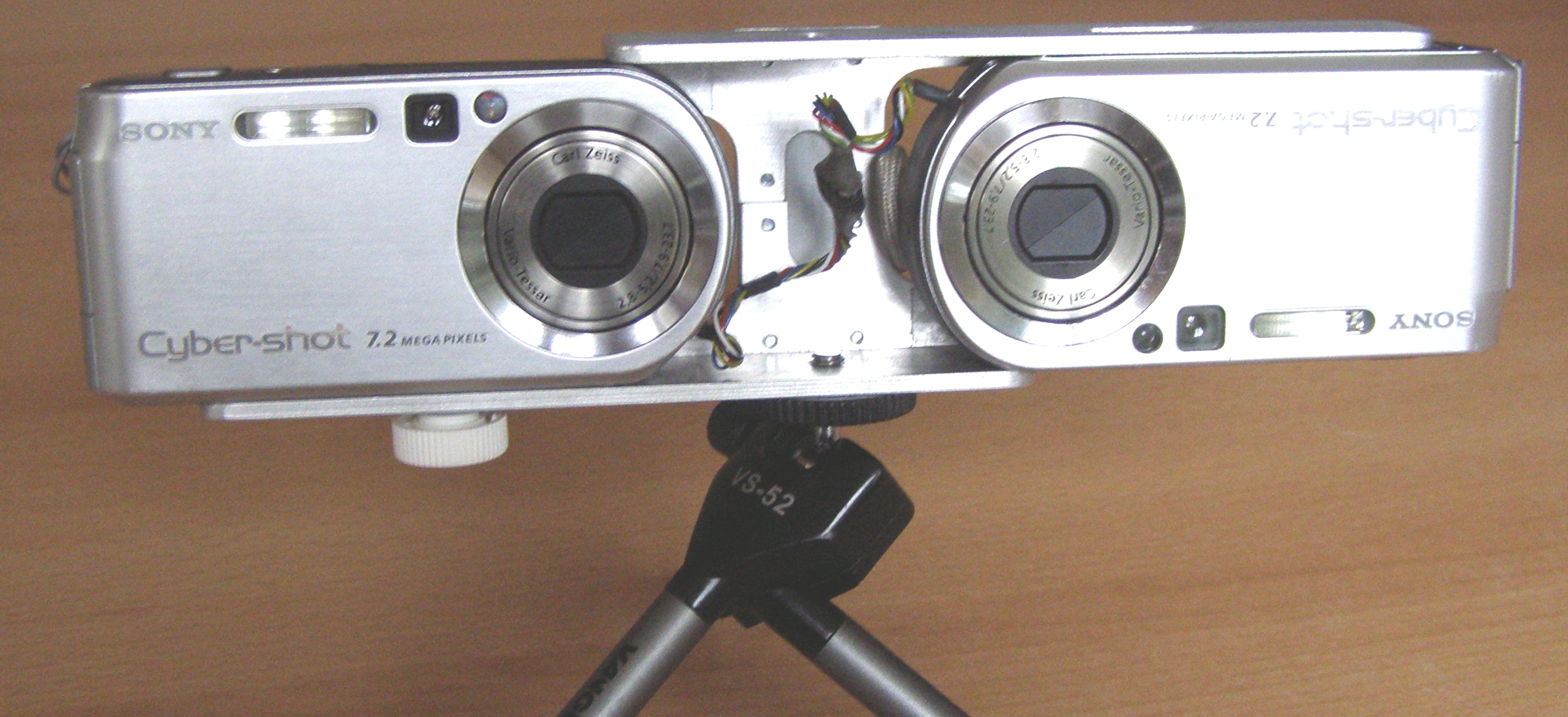 Stereocamera